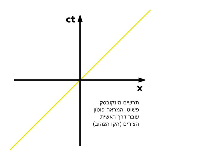 תרשים מינקובסקי פשוט, המראה פוטון עובר דרך ראשית הצירים (הקו הצהוב)